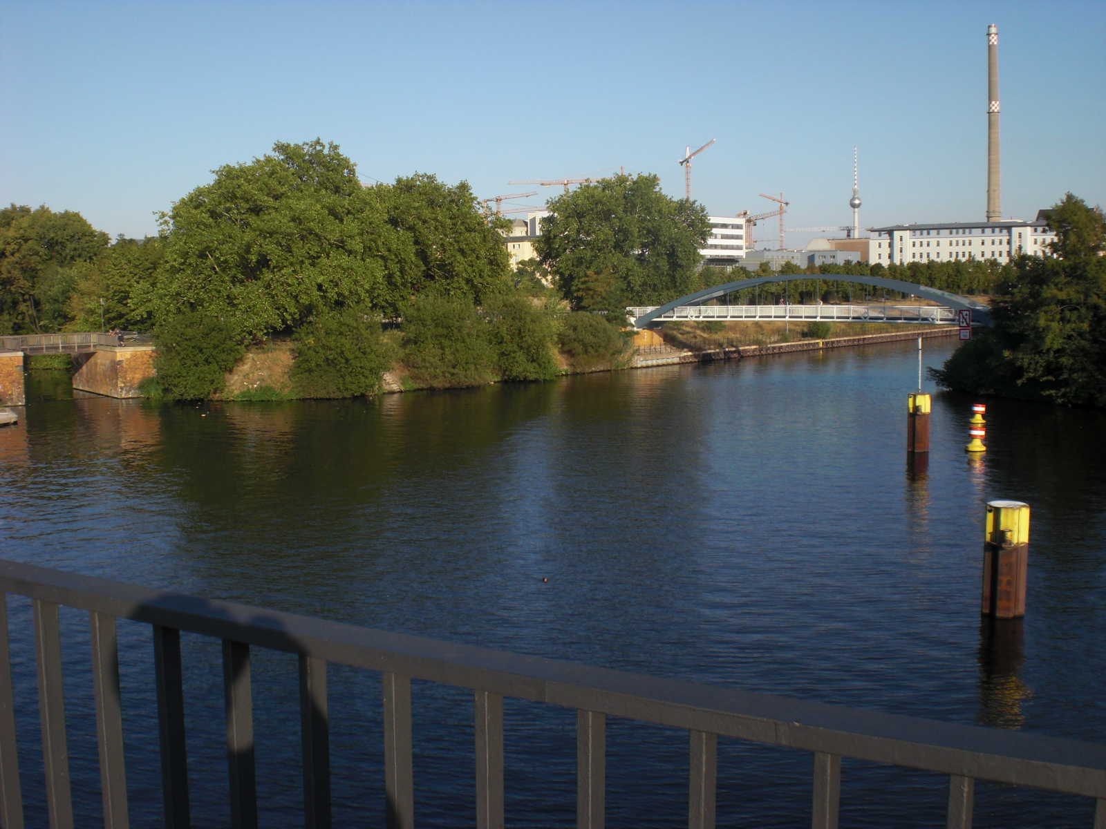 Berliner Nordhafen, Blick nach Südosten